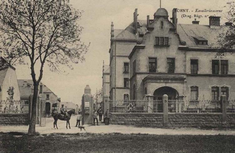 Wache der Kavalleriekaserne Dragoner 13